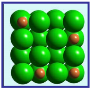 Aleazio interstiziala